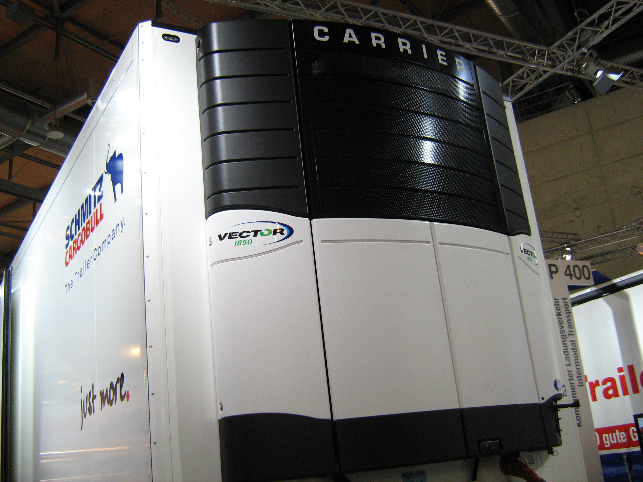 Auflieger Kühlmaschiene an der Vorderseite vom Typ Carrier